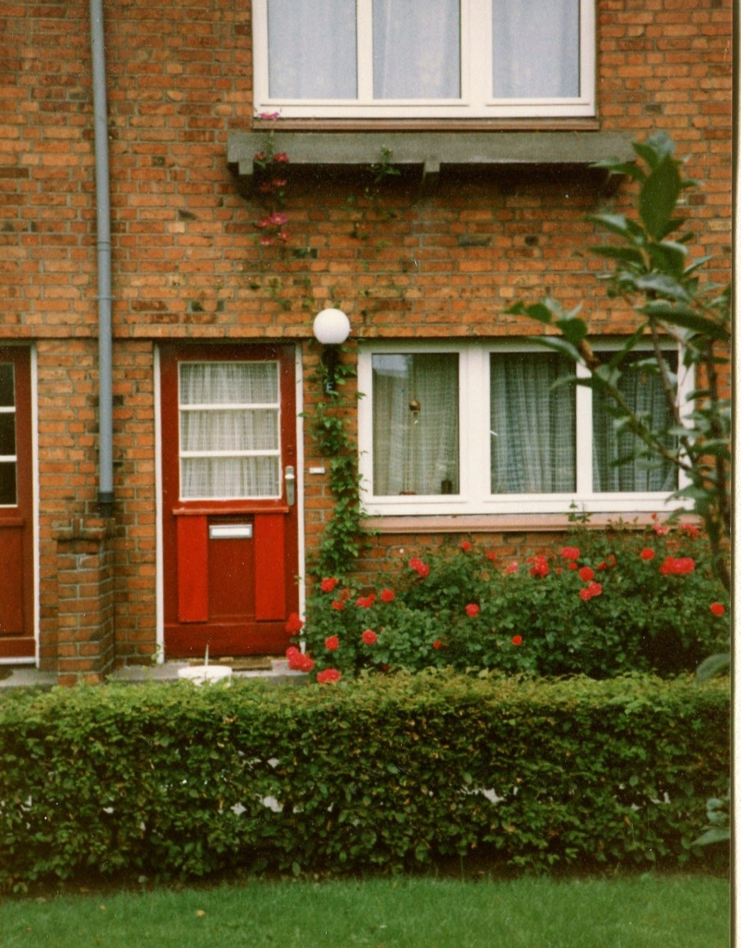 Eingang des denkmalgeschützten Reihenhäuses Kornweg 17 e in Hamburg-Ohlsdorf. Die Farben des Hauses und auch der Eternit-Blumenkasten sind vorgeschrieben.